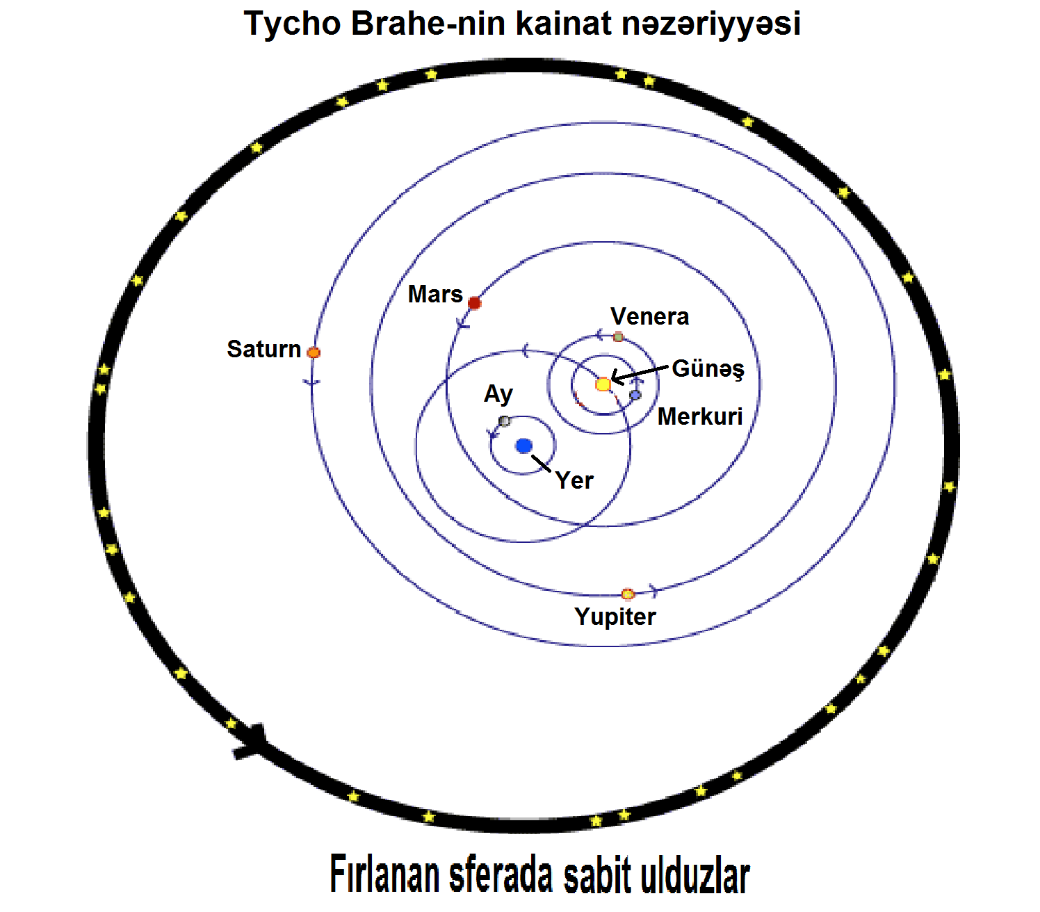 Kainət nəzəriyyəsi